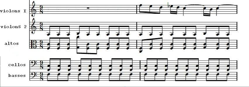 début du divertimento de béla bartok